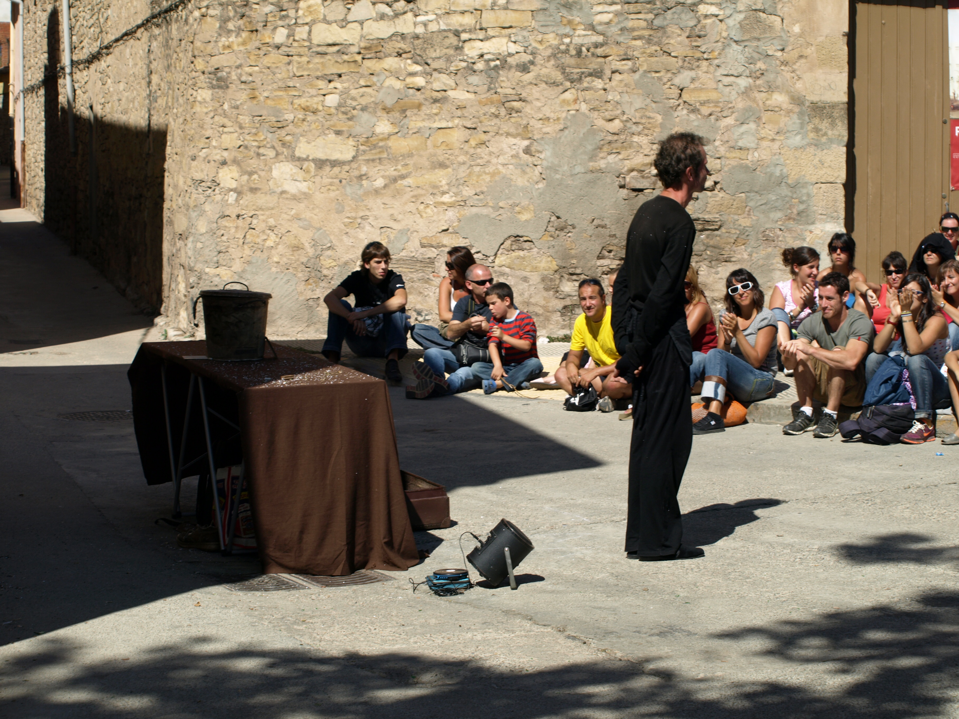 Fira Tàrrega 2008 e